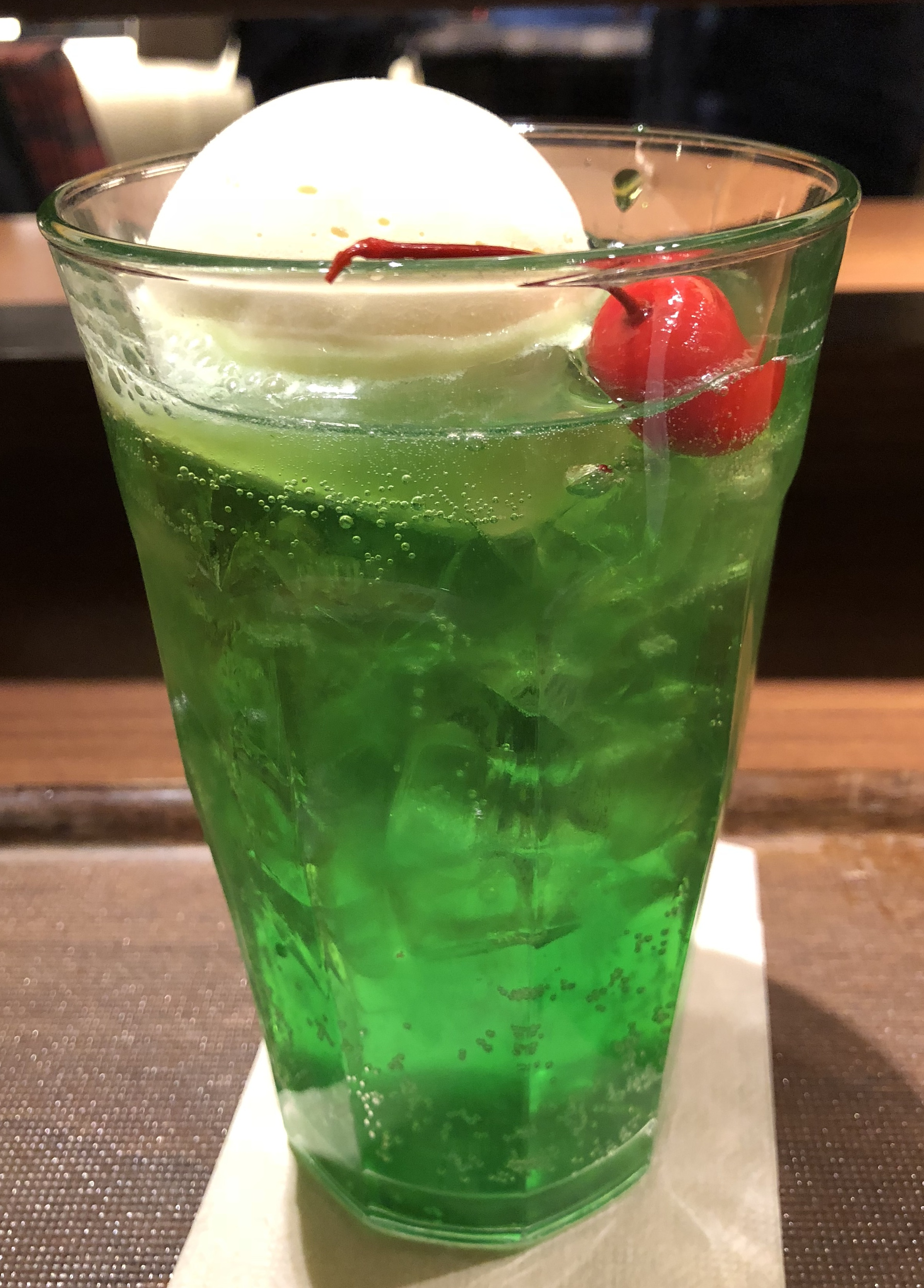 上島珈琲店のja:クリームソーダ